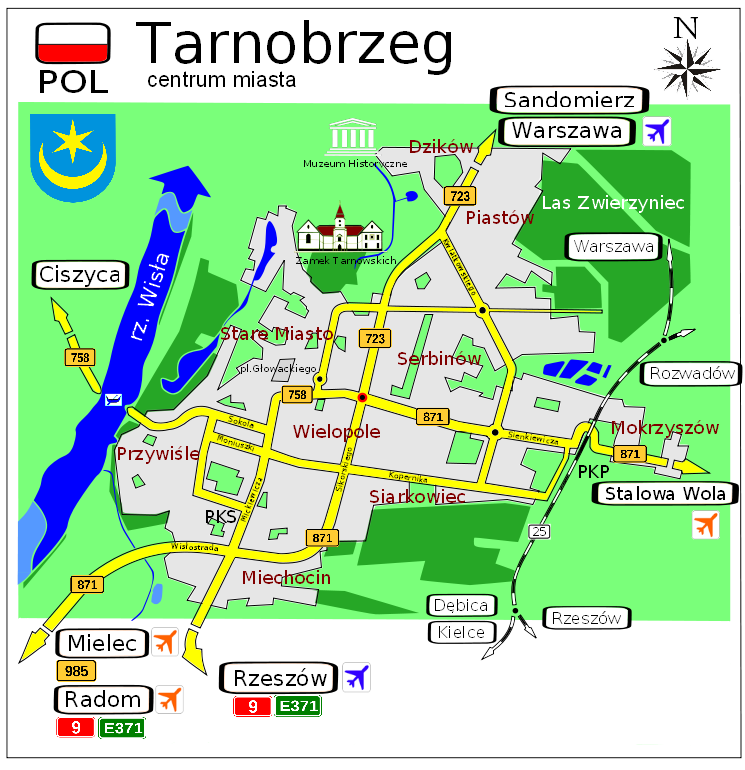 Tarnobrzeg - centrum miasta, ulice, osiedla, drogi...